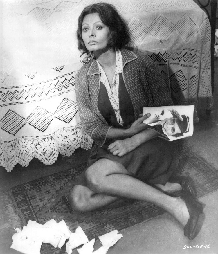 Sophia Loren, skådespelerska, Italien. Ur filmen "Sunflower".